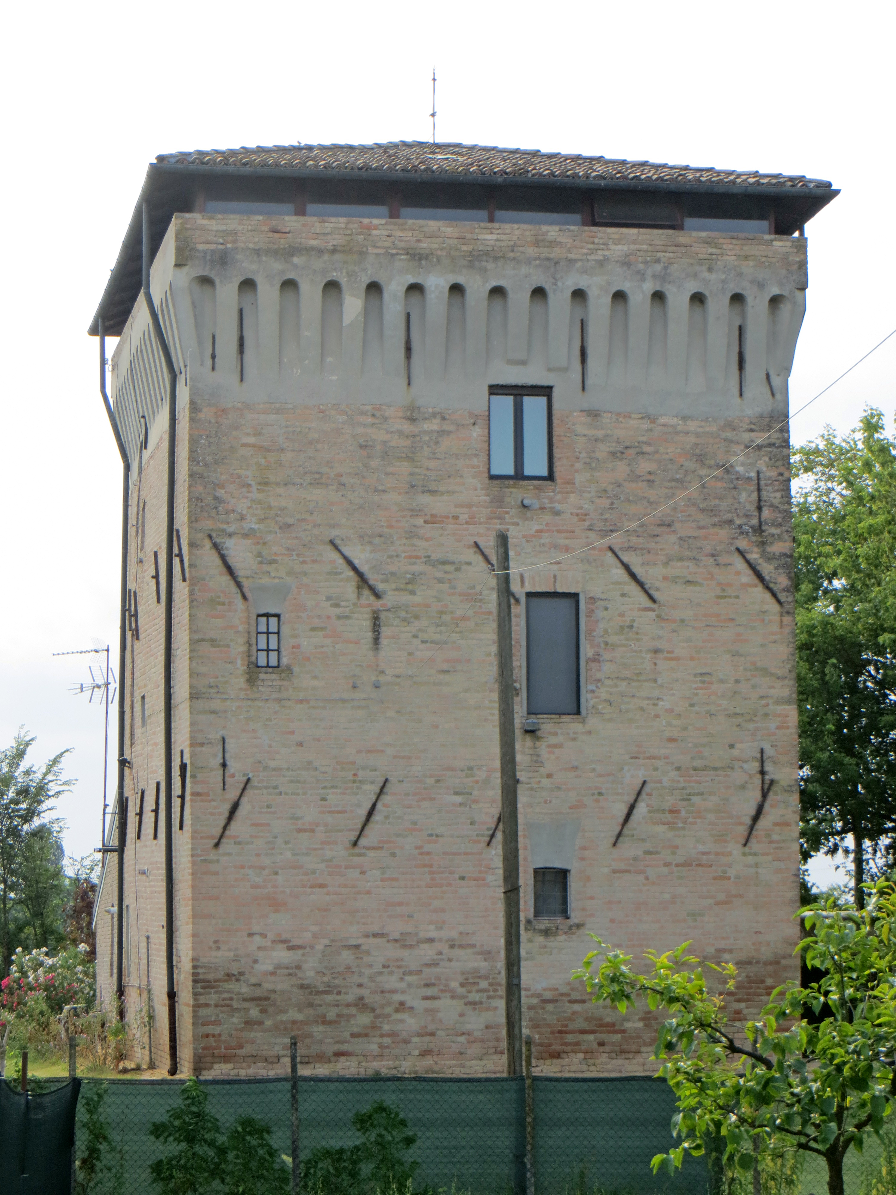 Torrione (Beneceto, Parma) - lato est